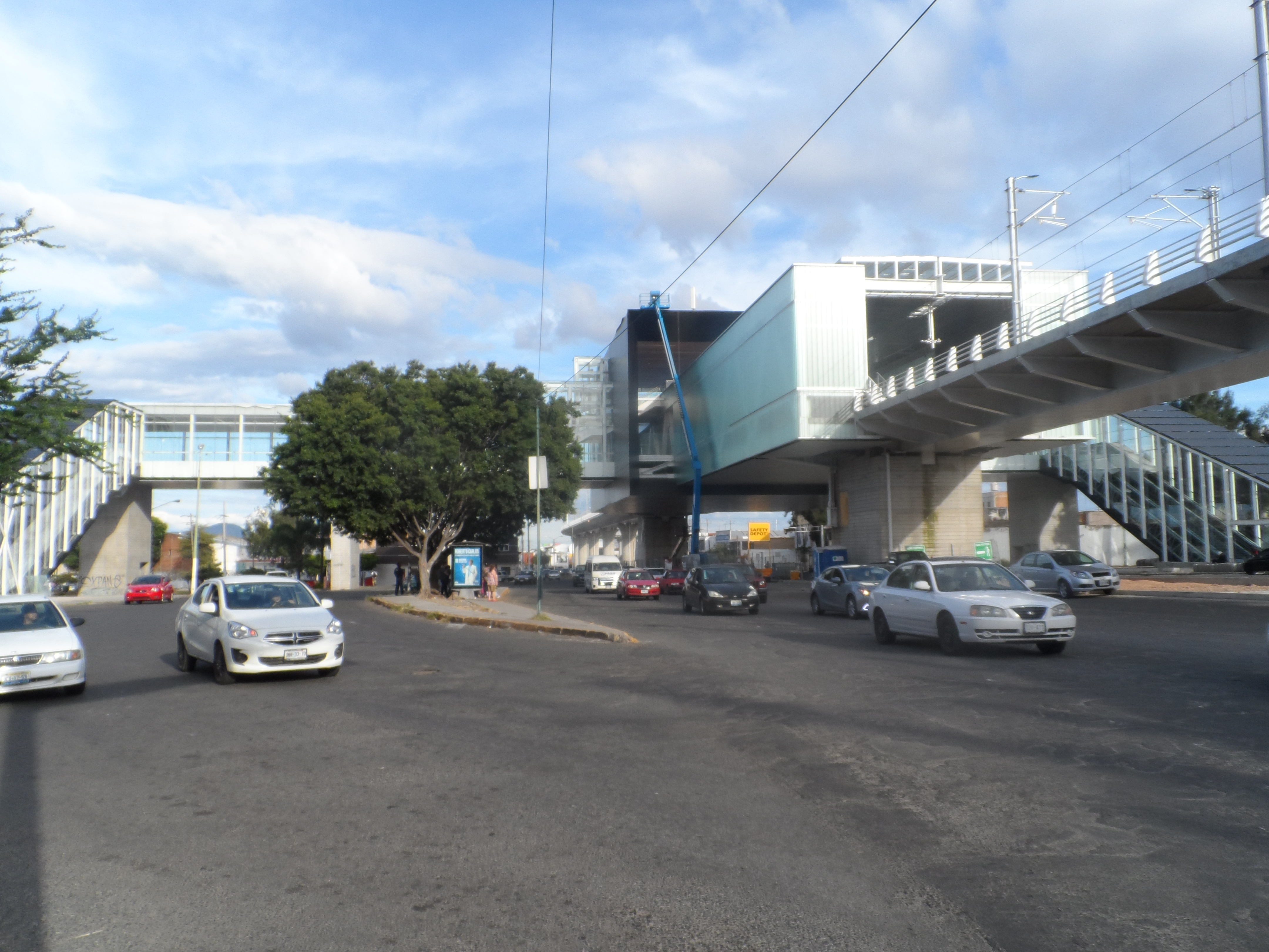 Vista externa de la estación "Mercado del Mar" de la Línea 3 del Tren Ligero de Guadalajara.